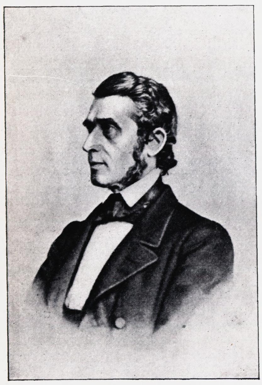 Illustrasjon hentet fra boken "En Christianiensers Erindringer fra 1850- og 60-Aarene" av Nielsen, Yngvar og utgitt av Gyldendal (Kristiania, 1910) Depicted person: Frederik Ludvig Vibe